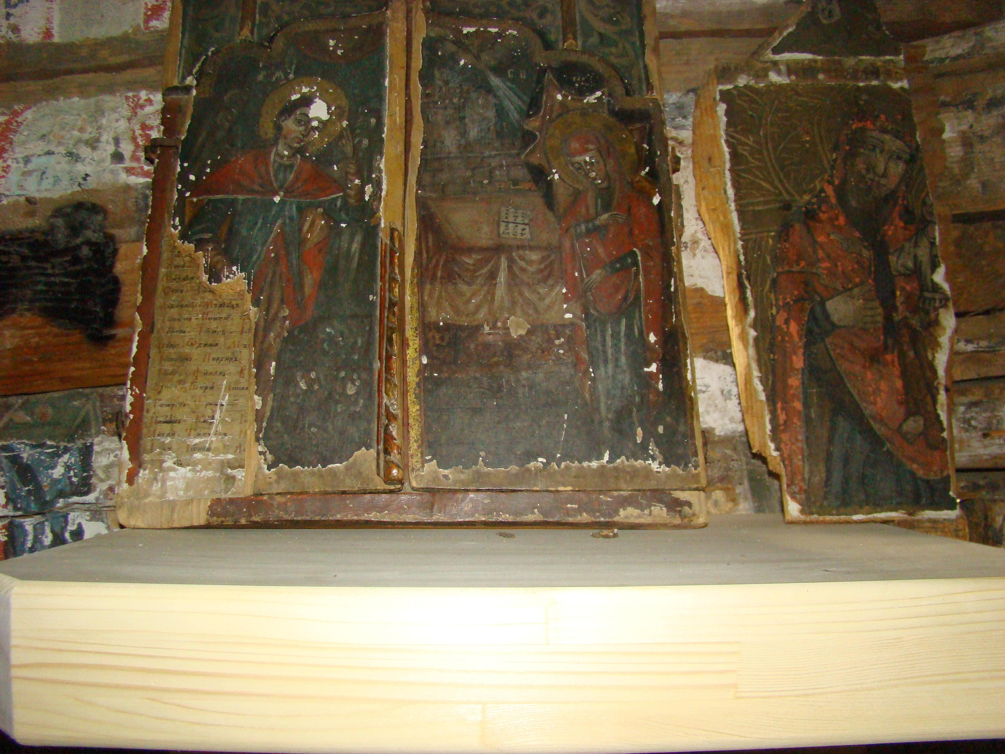 Biserica de lemn "Adormirea Maicii Domnului" a fostei mănăstiri "Izvoru Negru" , sat MOISEI 01